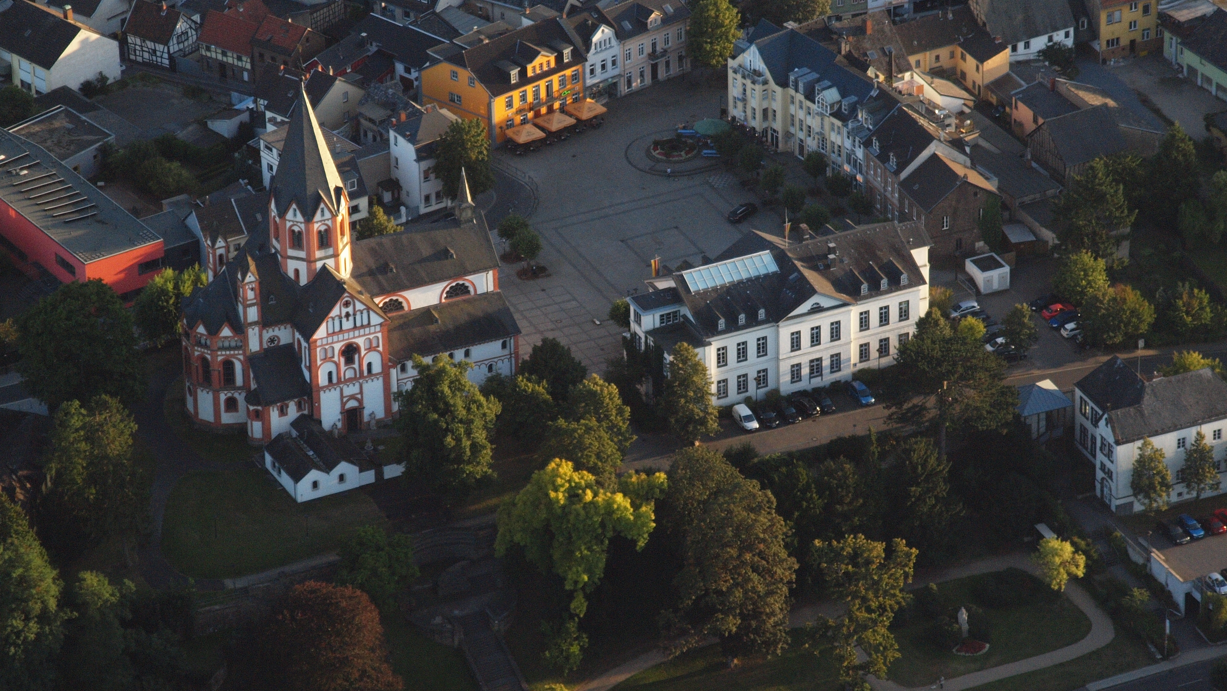 Sankt Peter, Sinzig